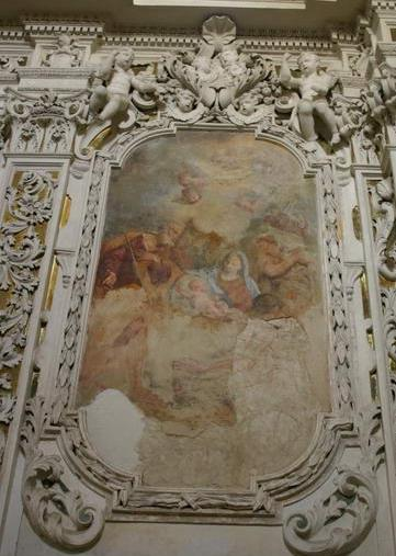 Church Messina Chiesa di Sant'Elia